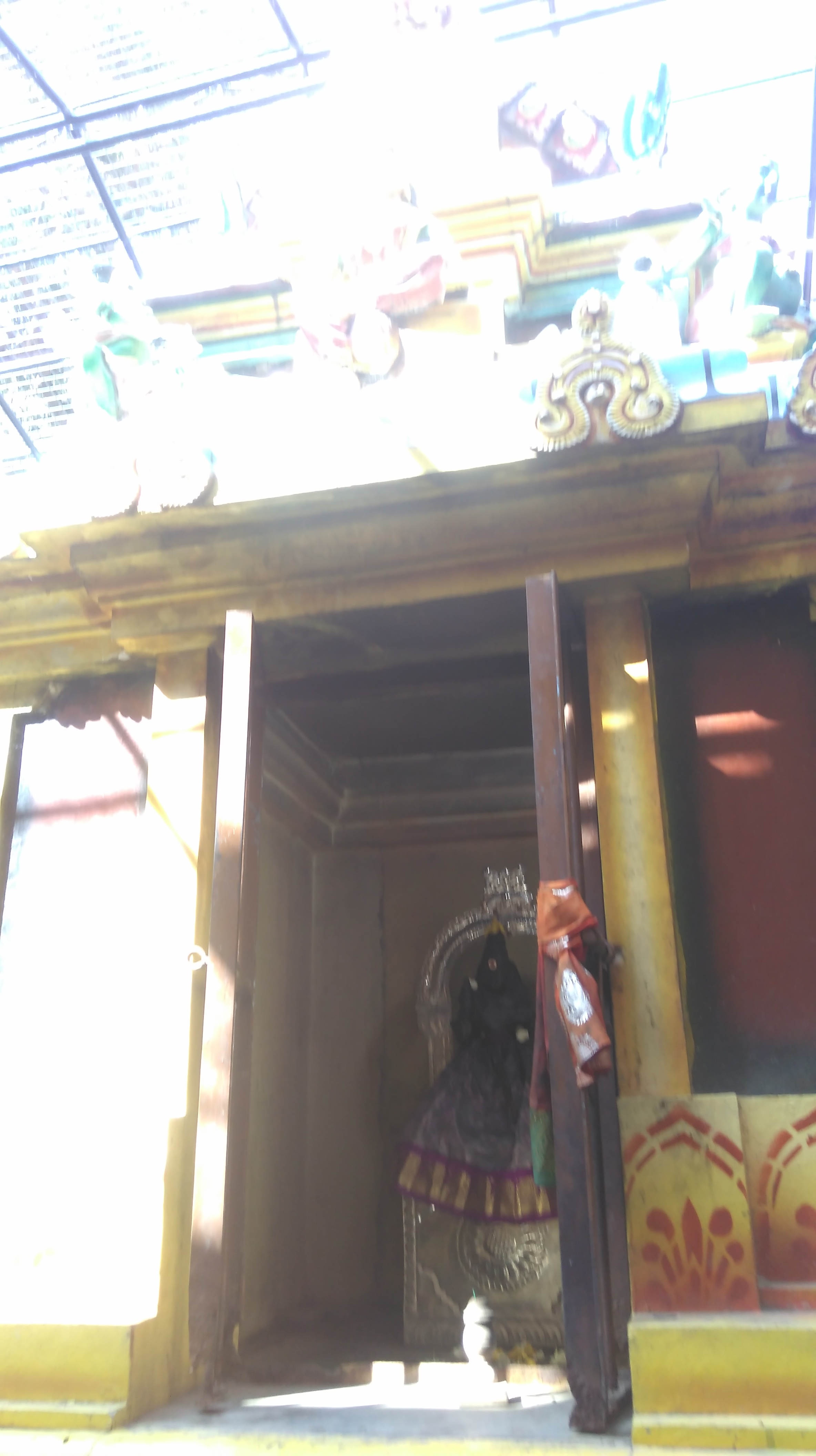 சண்டேஸ்வரி விக்கிரகம்